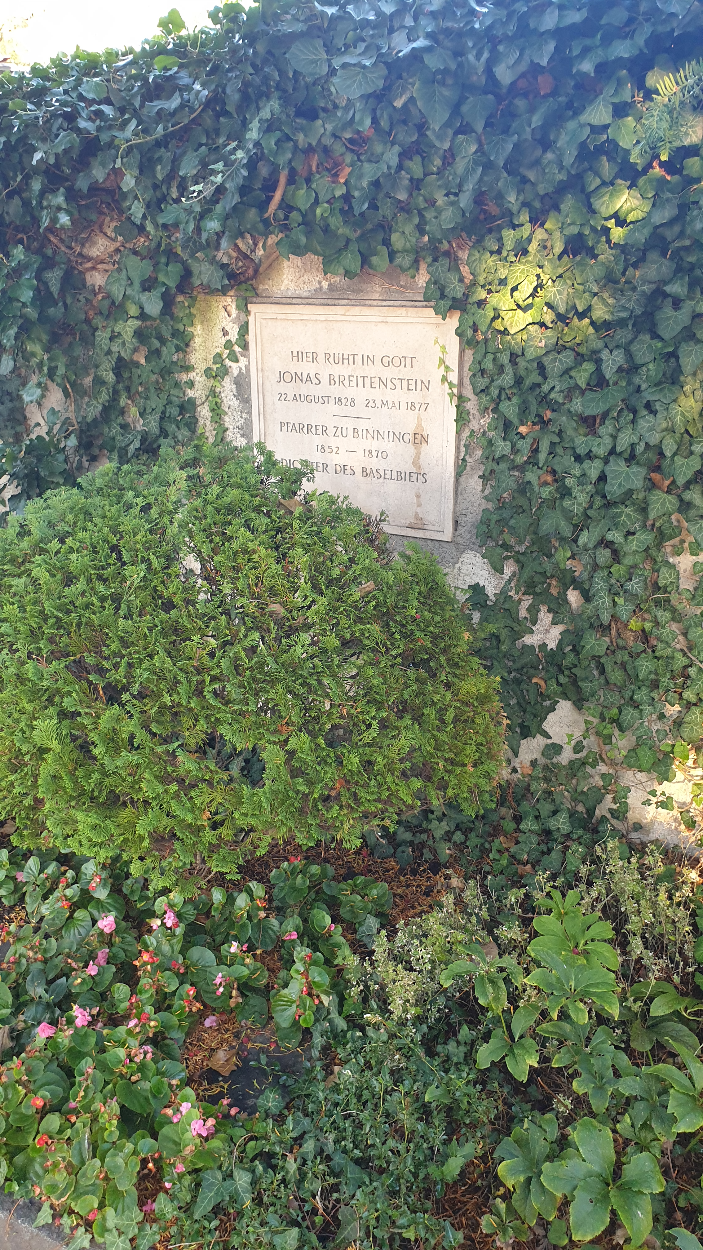 Grabstein mit Todesjahr 1877